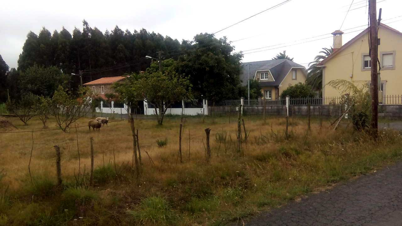 Vista de Ciobre, O Val.